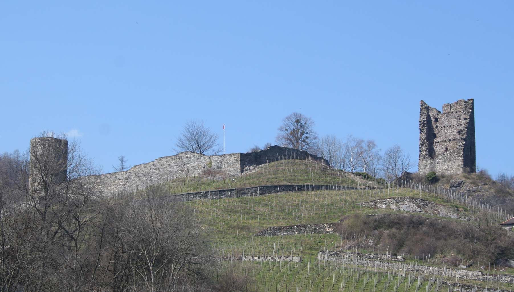 Ruine Freudenberg